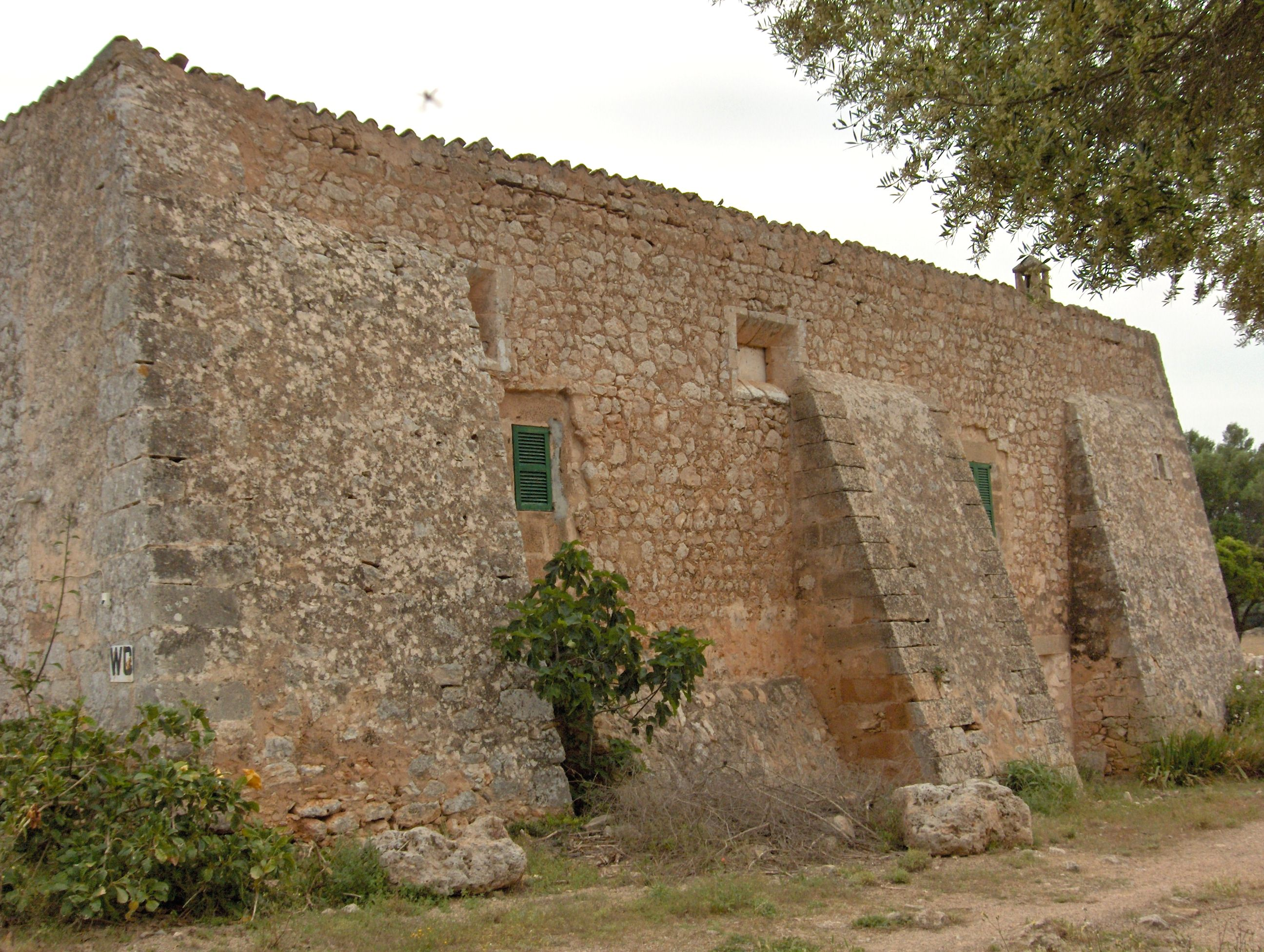 Cases de la possessió de Capocorb Vell, a la marina de Llucmajor, Mallorca.